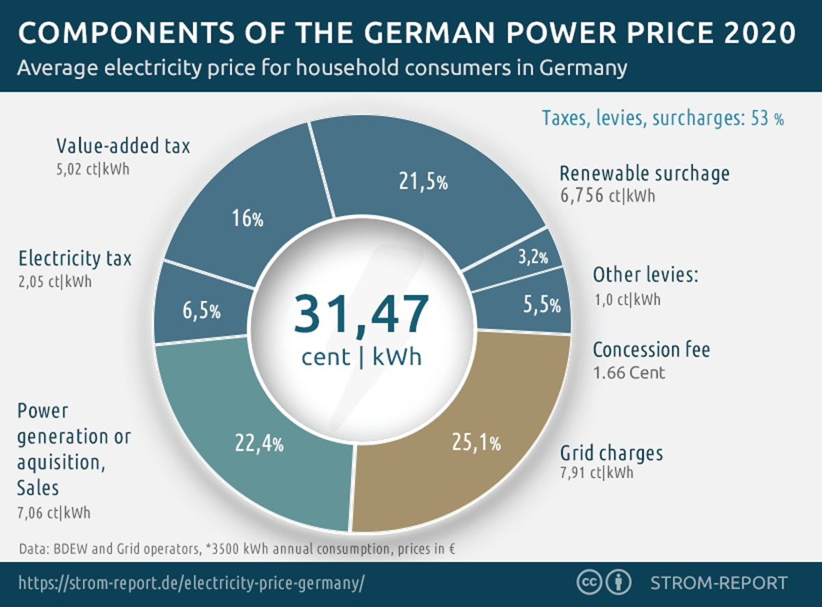 Components German Electricity Price 2016 for households and small businesses (new Version 2017)